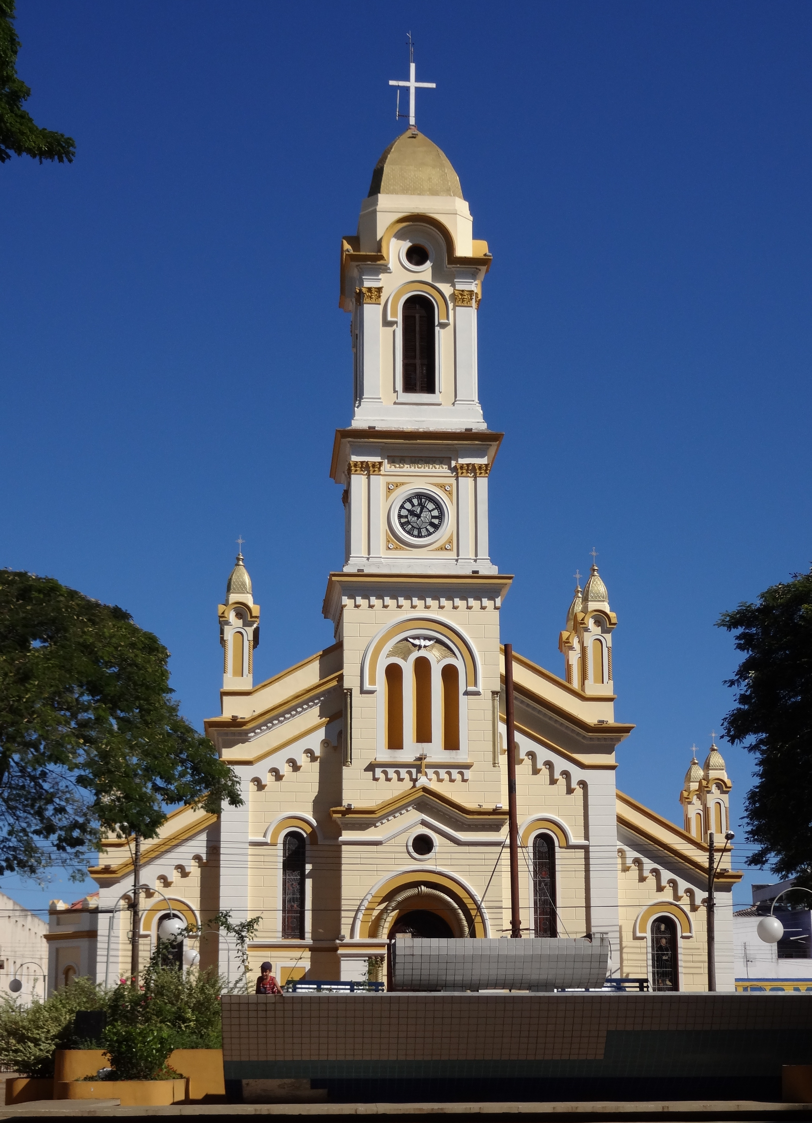 Igreja Matriz de Capão Bonito SP.